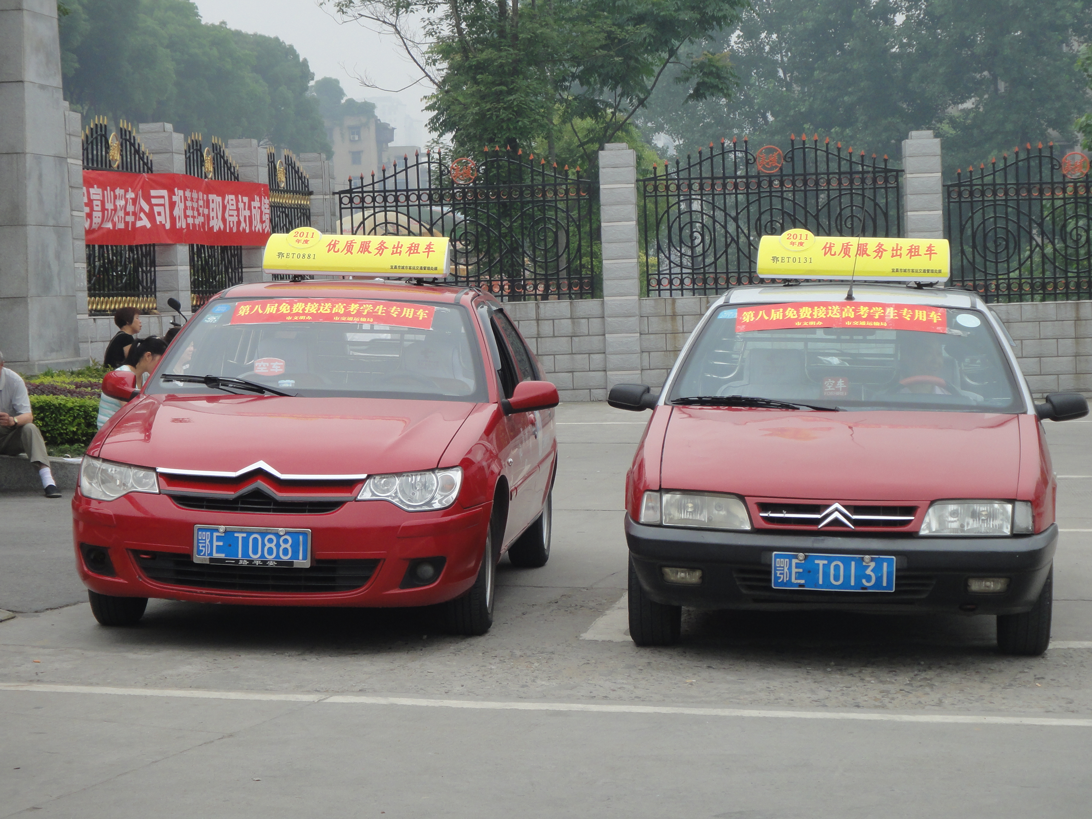 中国大陆2012年普通高等学校招生全国统一考试 免费接送高考学生专用车